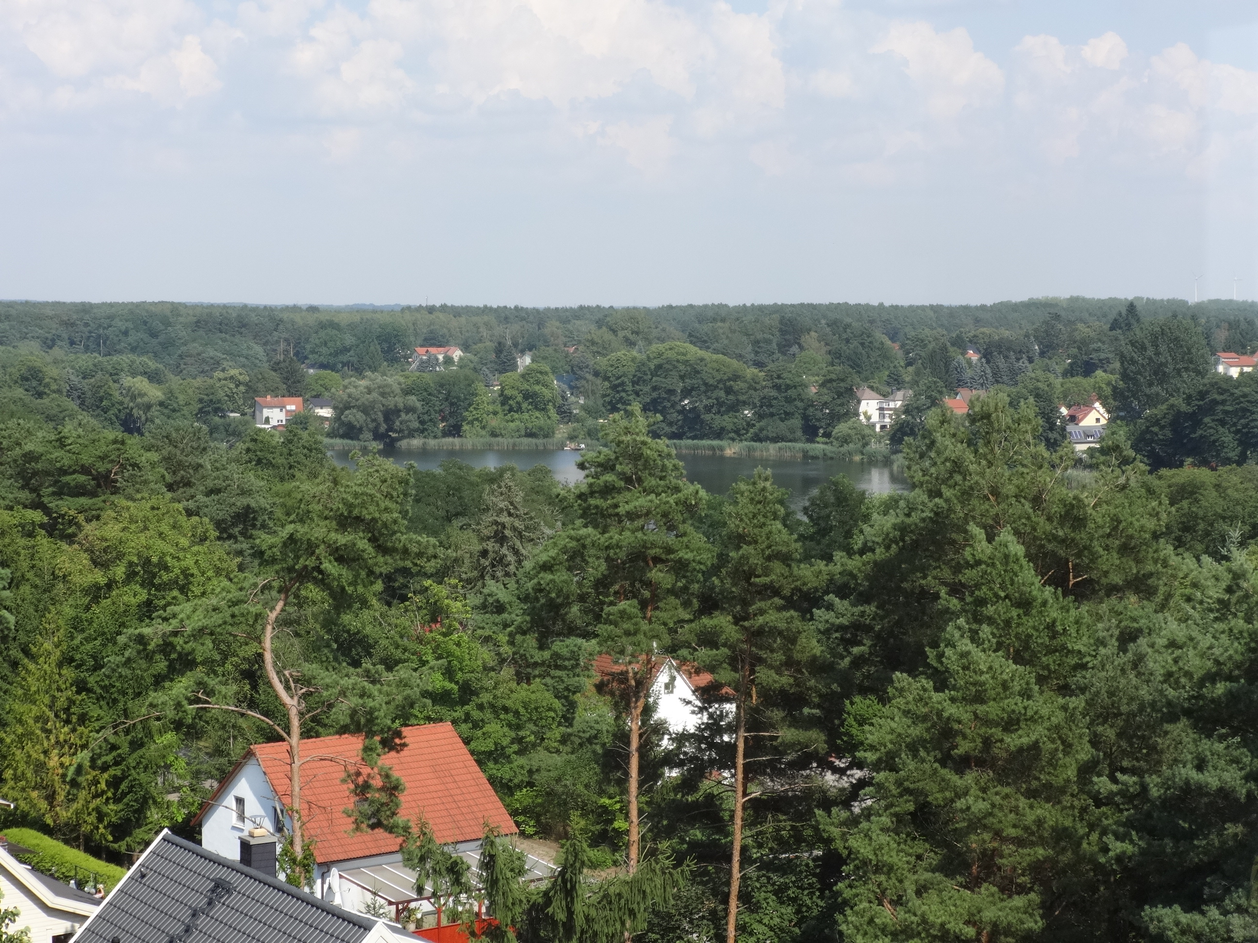 Blick auf den Kleinen Stienitzsee vom Wachtelturm in Hennickendorf, Brandenburg